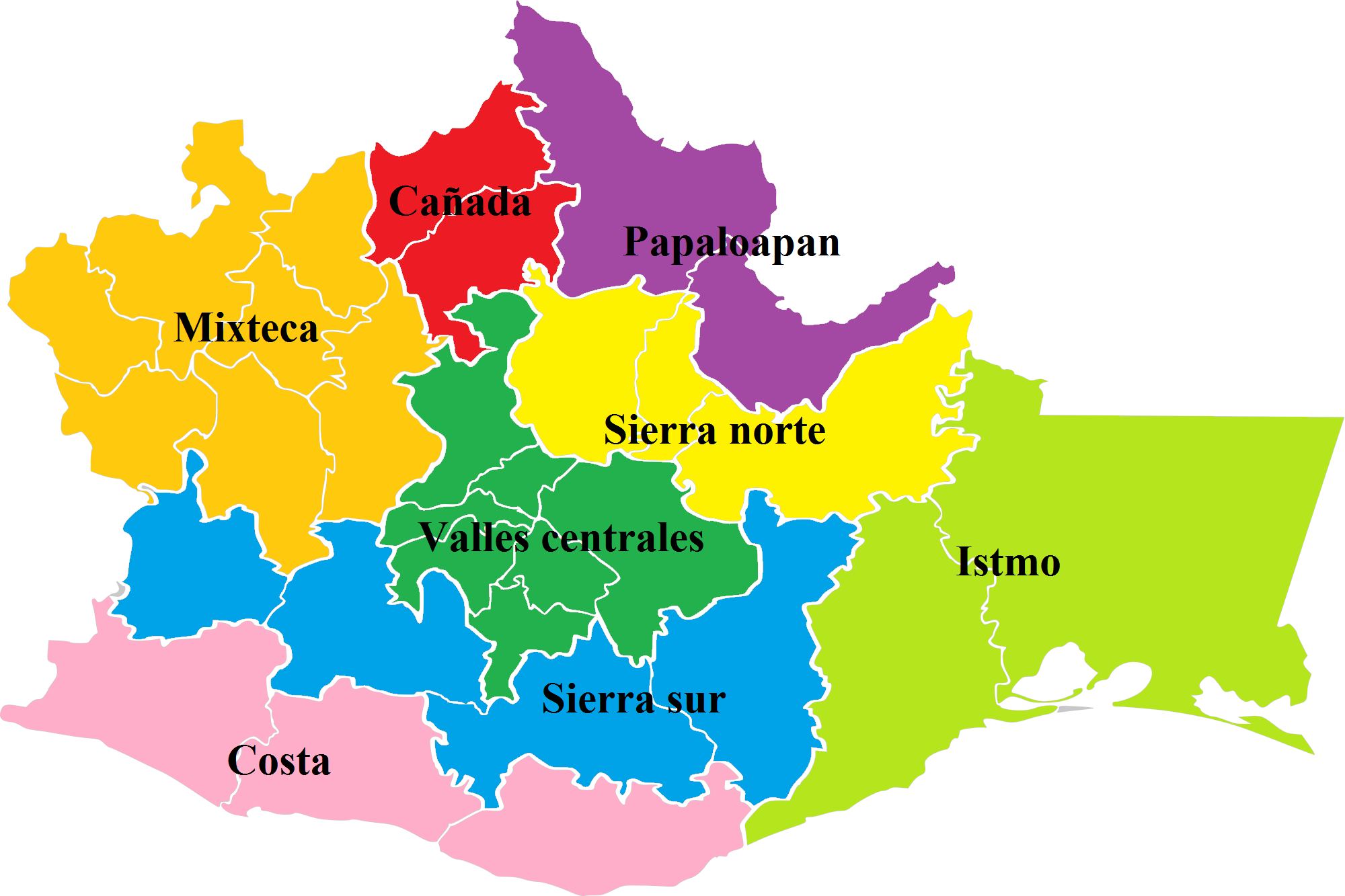 Mapa que muestra al estado mexicano de Oaxaca dividido según sus regiones.